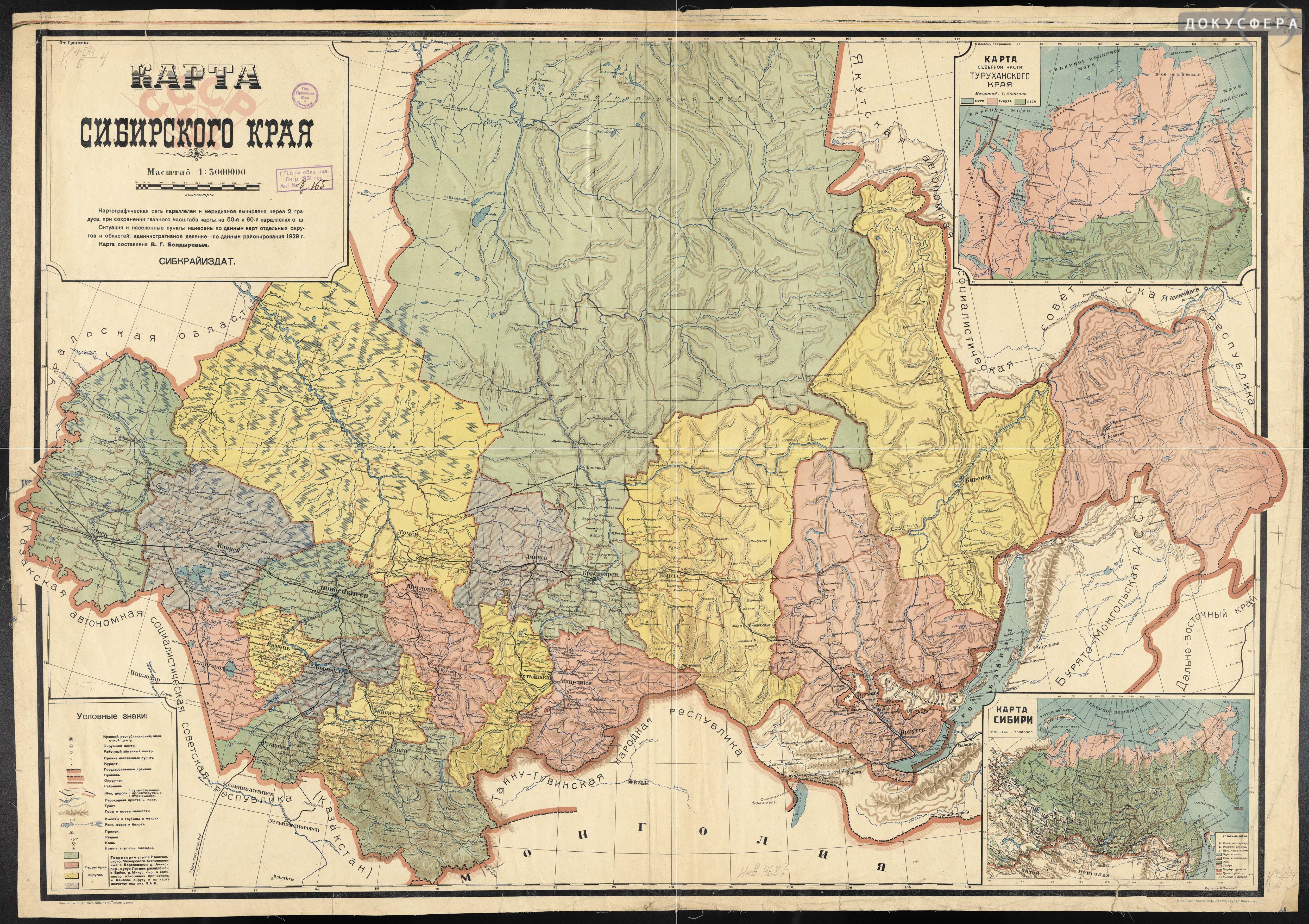 Карта Сибирского край 1929